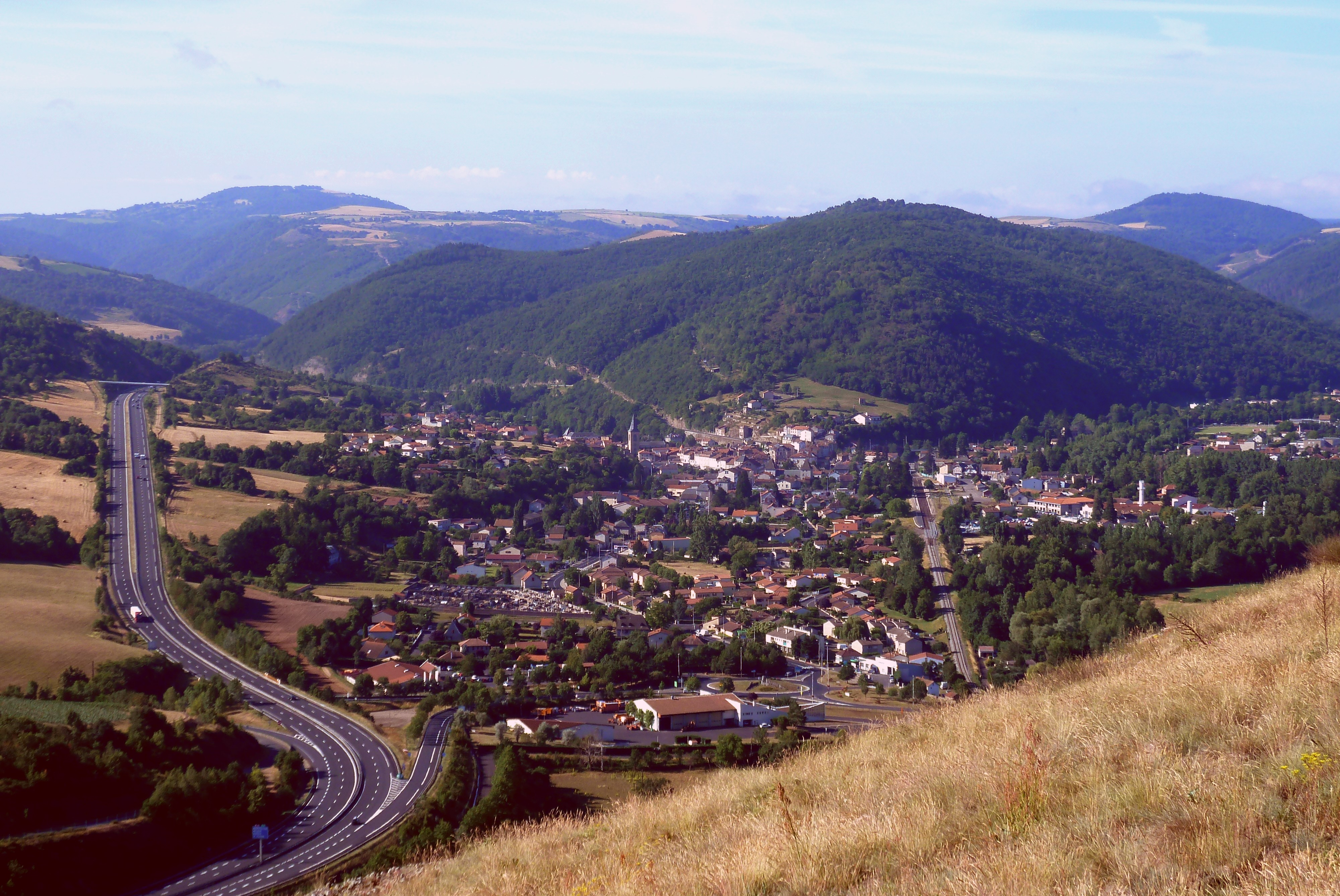 L'autoroute A75 et Massiac vus depuis le plateau de Chalet